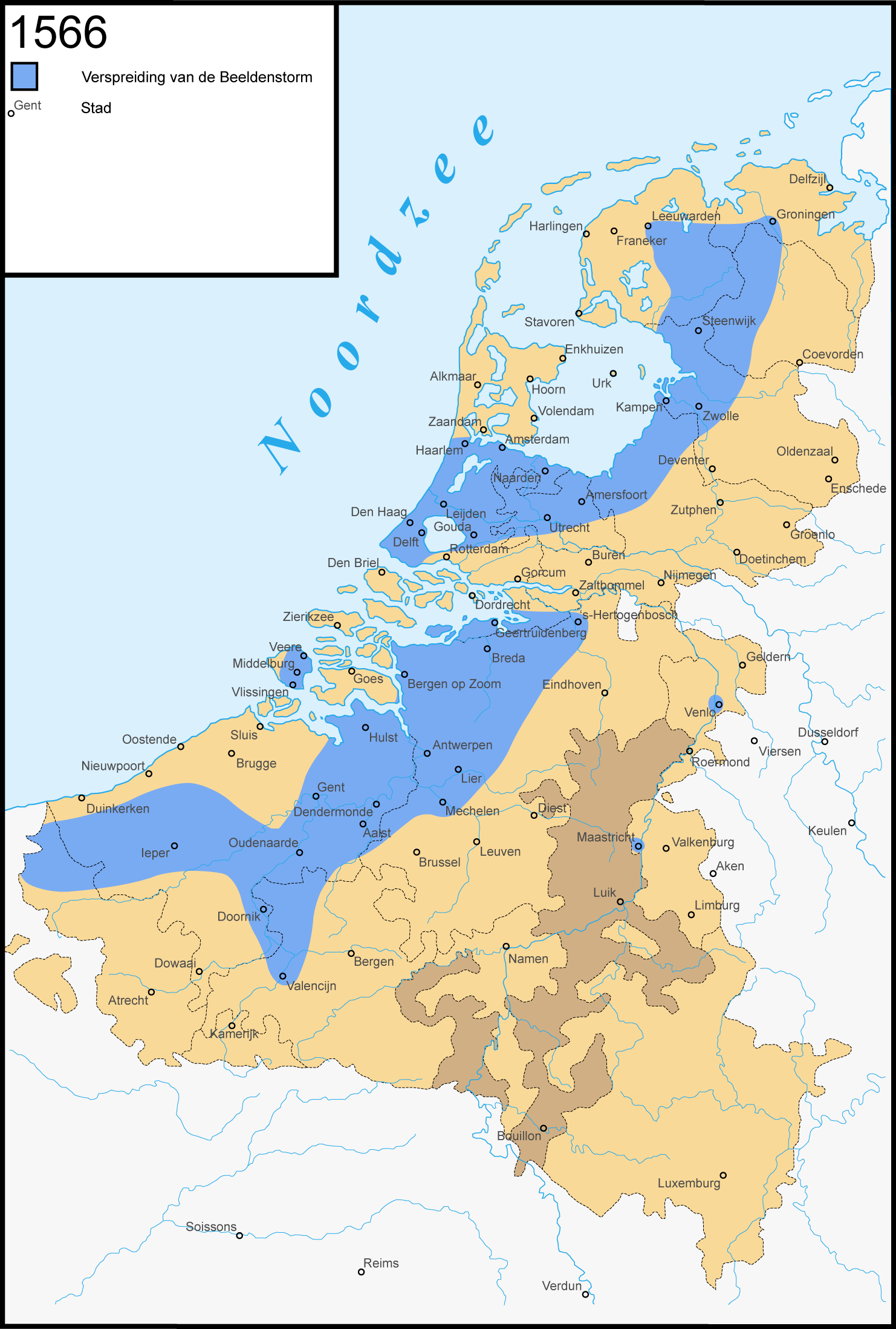 Beeldenstorm van 1566. Nederlandse .png versie Engels: Beeldenstorm (Iconoclasm) of 1566. Dutch .png version